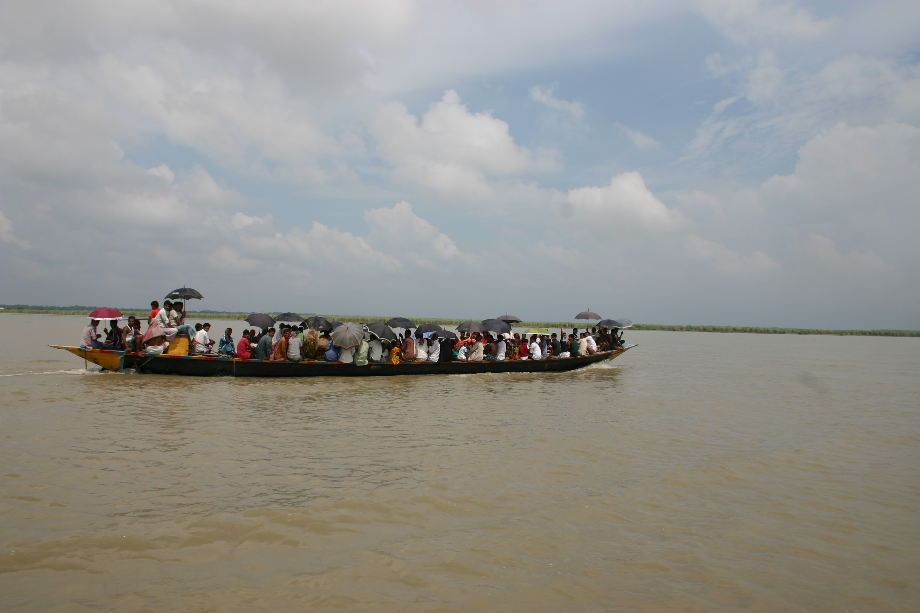 Jamuna River, Bangladesh